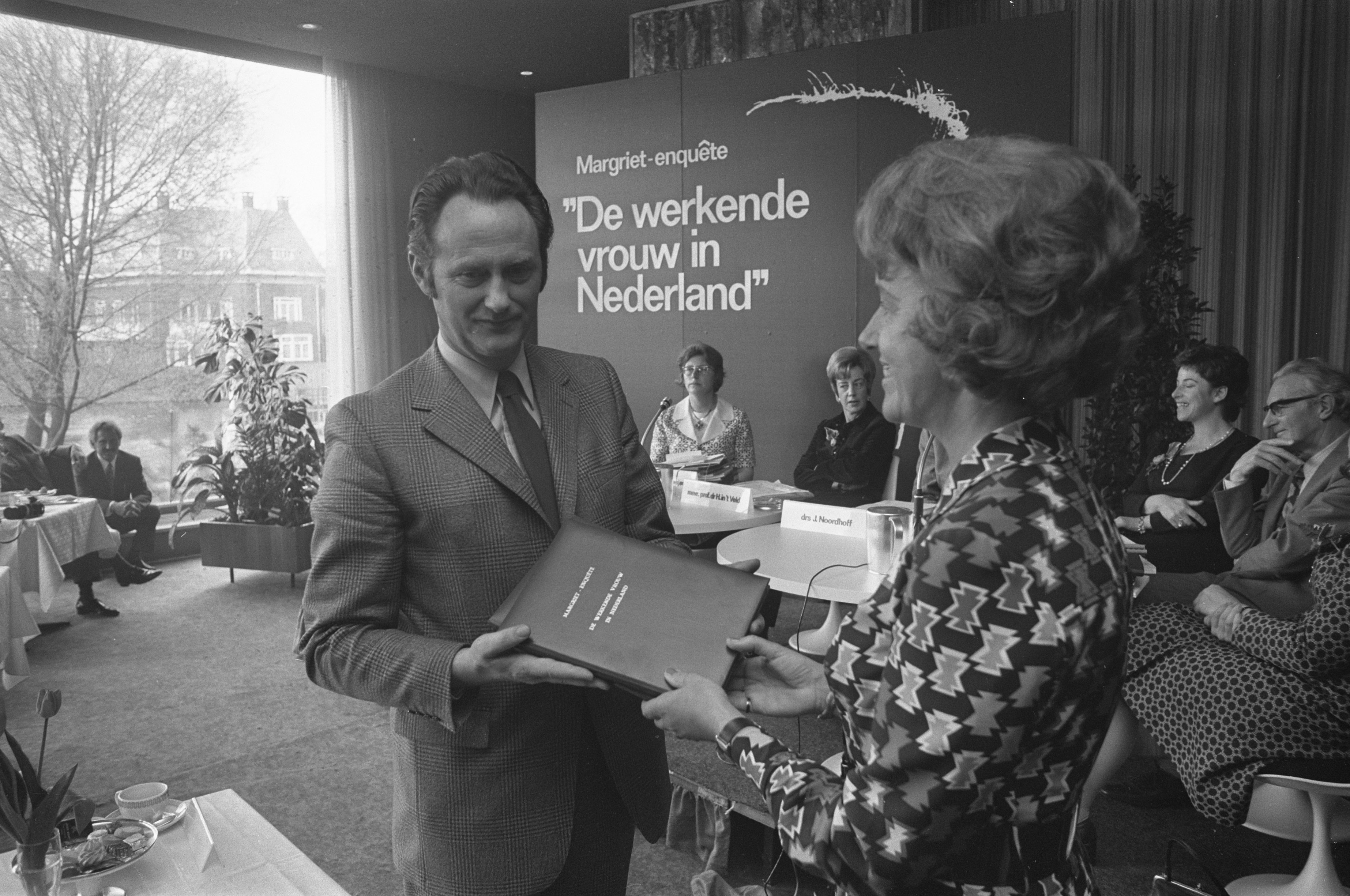 Resultaat van enquete Werkende vrouw in Nederland door het tijdschrift Margriet. Hoofdredacteur mevrouw H. van den Horst overhandigt het rapport aan Minister Boersma. 27 april 1972